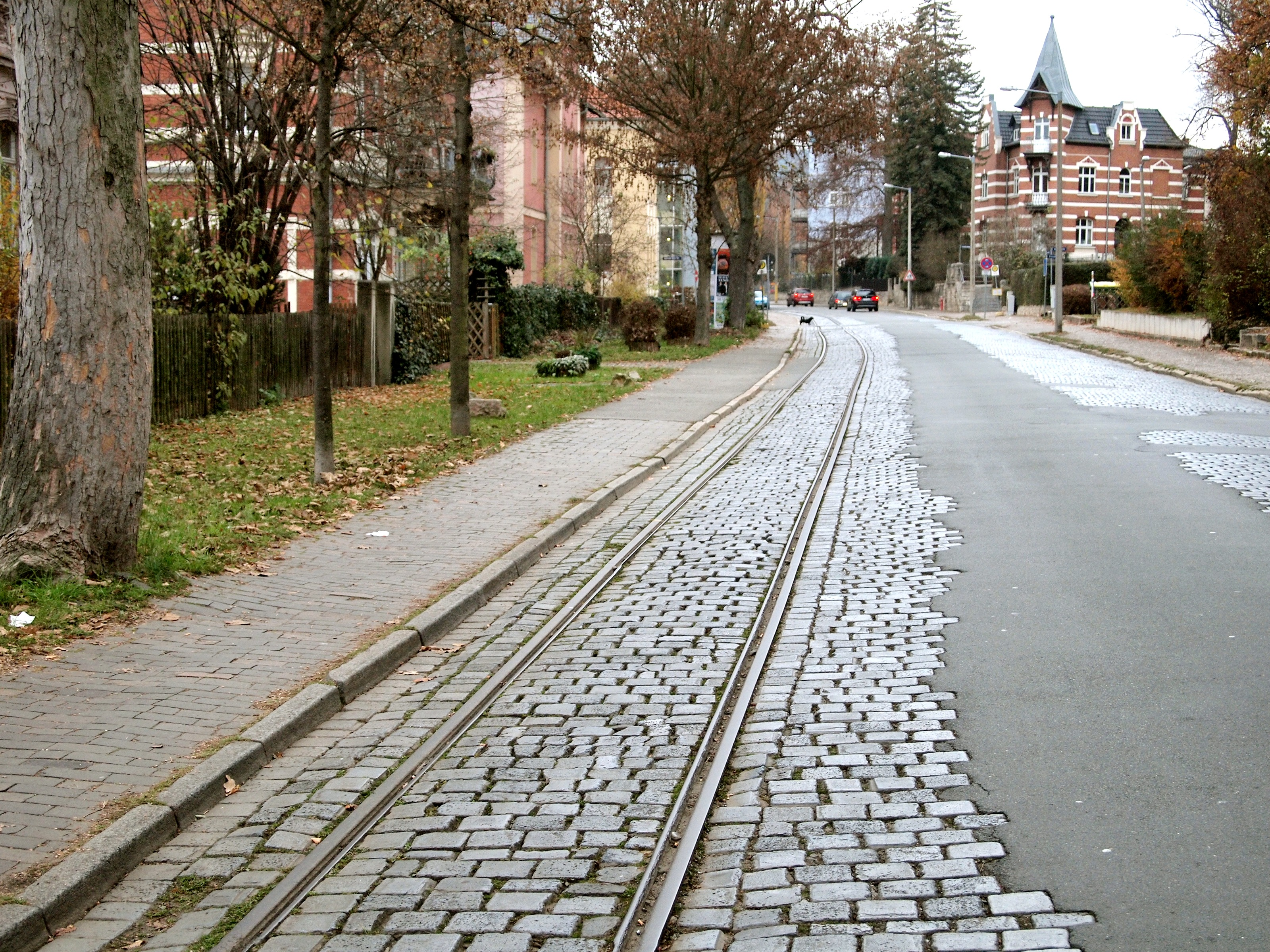 Stillgelegte Straßenbahnstrecke zum Mühltal in der August-Bebel-Straße in Jena im November 2011